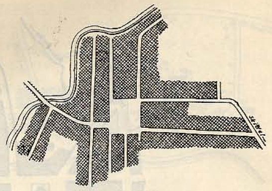 Беларуская (тарашкевіца): Азёры (Aziory)